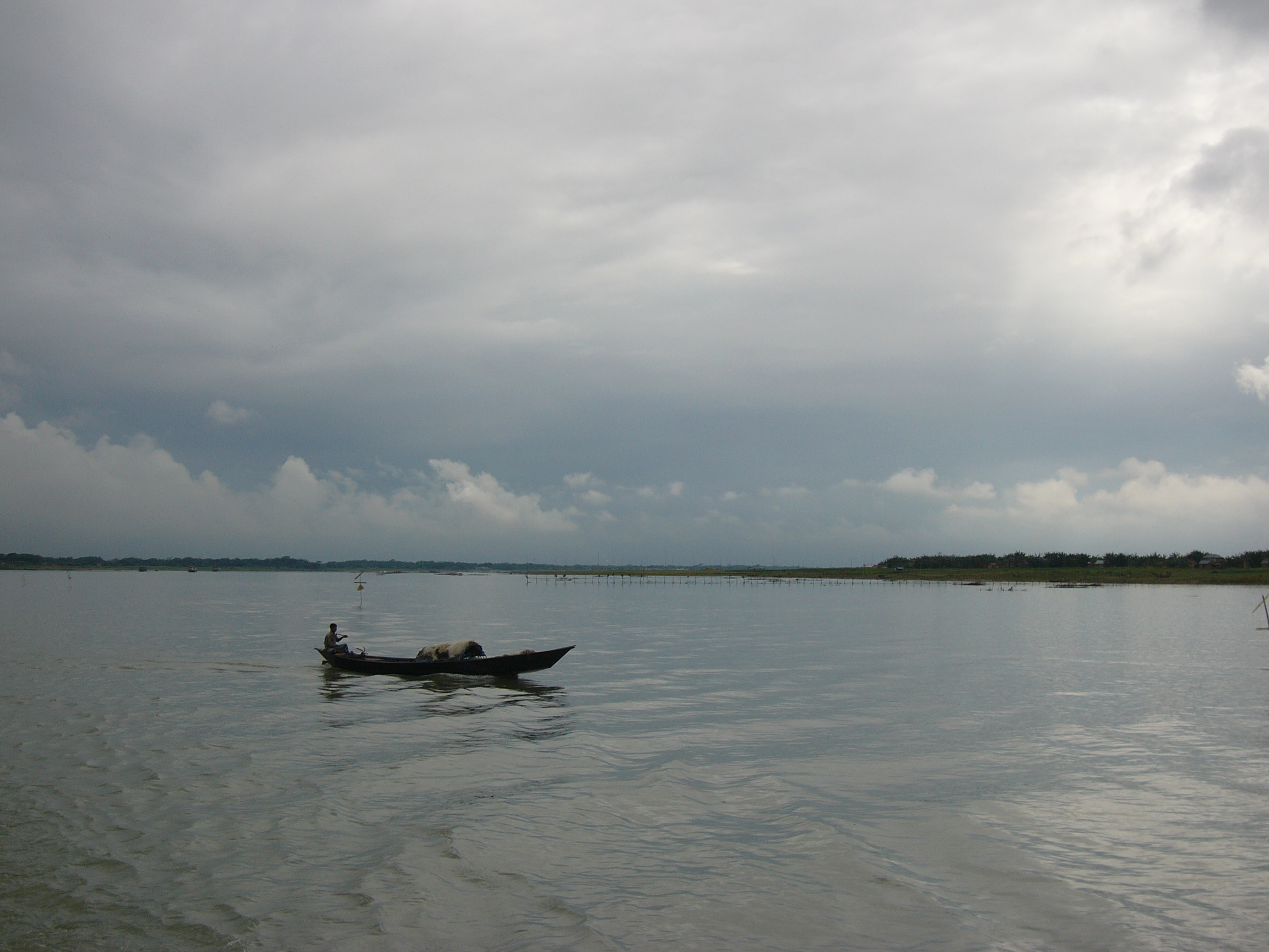 Padma River Bangladesh